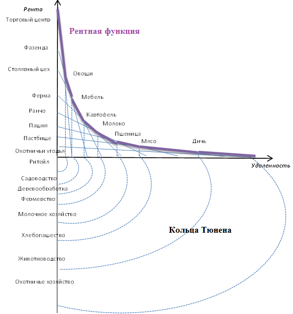 Модель Тюнена -Лаунхардта